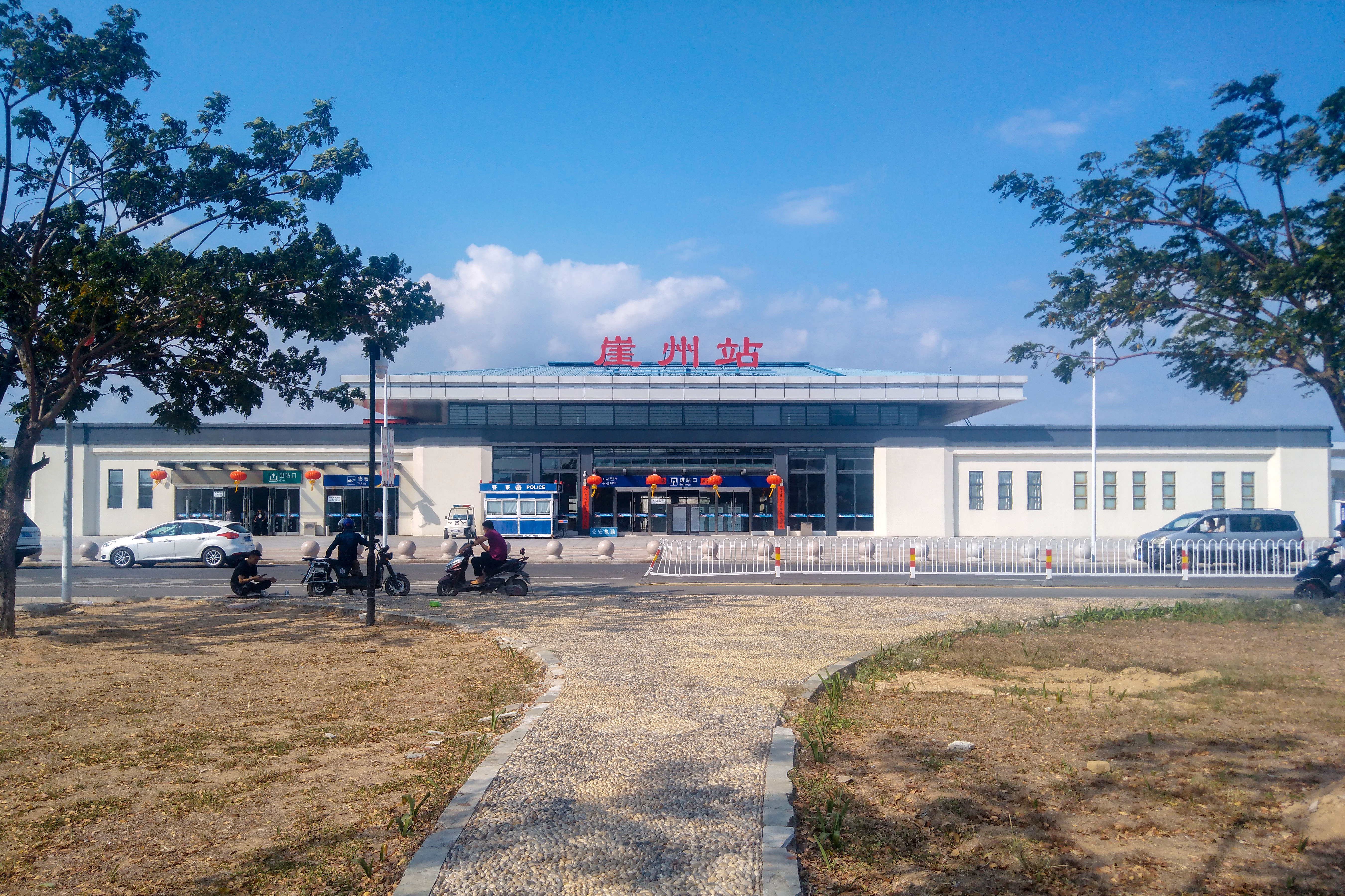 崖州站站房